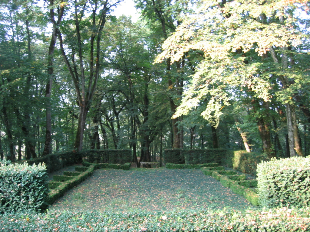 Parc du Chateau de Arlay dans le Jura (France)